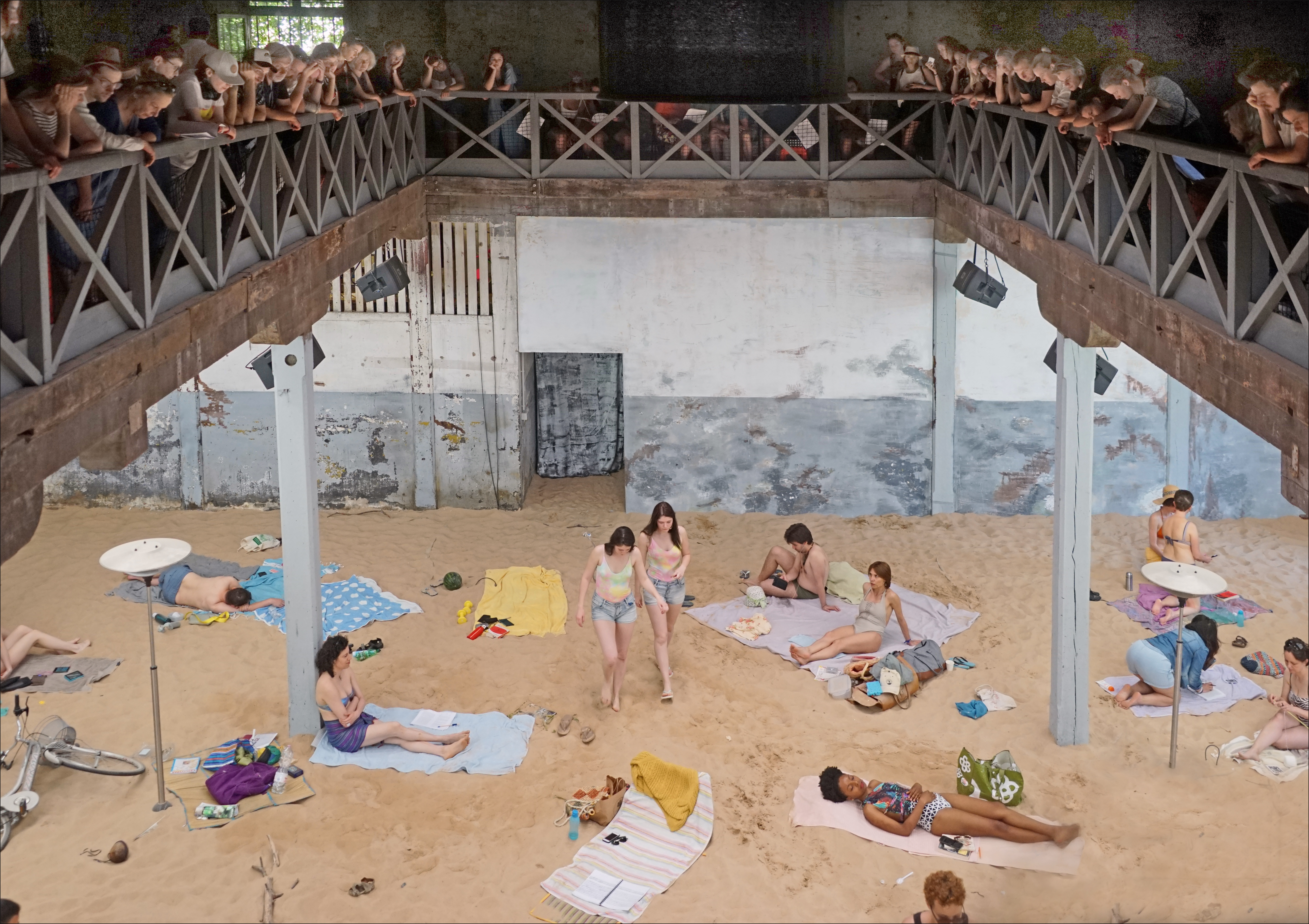 Sun & Sea (Marina) Opéra-performance pour 13 voix Rugile Barzdziukaite, Vaiva Grainyte et Lina Lapelyte Commissaire : Lucia Pietroiusti Production : Neon Realism Le pavillon national de la Lituanie a reçu le Lion d'or 2019 pour les pavillons nationaux. L'opéra implique 35 chanteurs et figurants qui sont en vacances sur une plage quelque part dans le monde. Leurs chants, en solo ou en choeur, font état d'évènements climatiques liés au réchauffement climatique, à la montée des eaux, à la disparition d'une partie de la faune et de la flore et à la pollution généralisée ce qui ne les empêche pas pour autant de continuer à prendre l'avion et à partir dans de nombreux pays pour profiter de la vie. Une grande insousiance règne dans ce groupe à l'image de notre société toute entière qui ne prend pas suffisamment au sérieux le réchauffement de la planète Les contenus de l'opéra comme le travail artistique et l'originalité de la scénographie ont permis à juste titre au pavillon de la Lituanie de recevoir la plus haute distinction de la Biennale. Certains critiques d'art ont néanmoins considéré que, malgré la qualité de la performance, il s'agissait de spectacle vivant et qu'en ce sens la compétition était faussée avec des pavillons exposant des oeuvres d'art plastique. Autre problème, la fréquence des représentations est hebdomadaire en raison du coût élevé de la production, ce qui limite fortement le nombre de visiteurs qui peuvent assister au spectacle et engendre un temps d'attente important. "Arsenale" Biennale d'art de Venise 2019